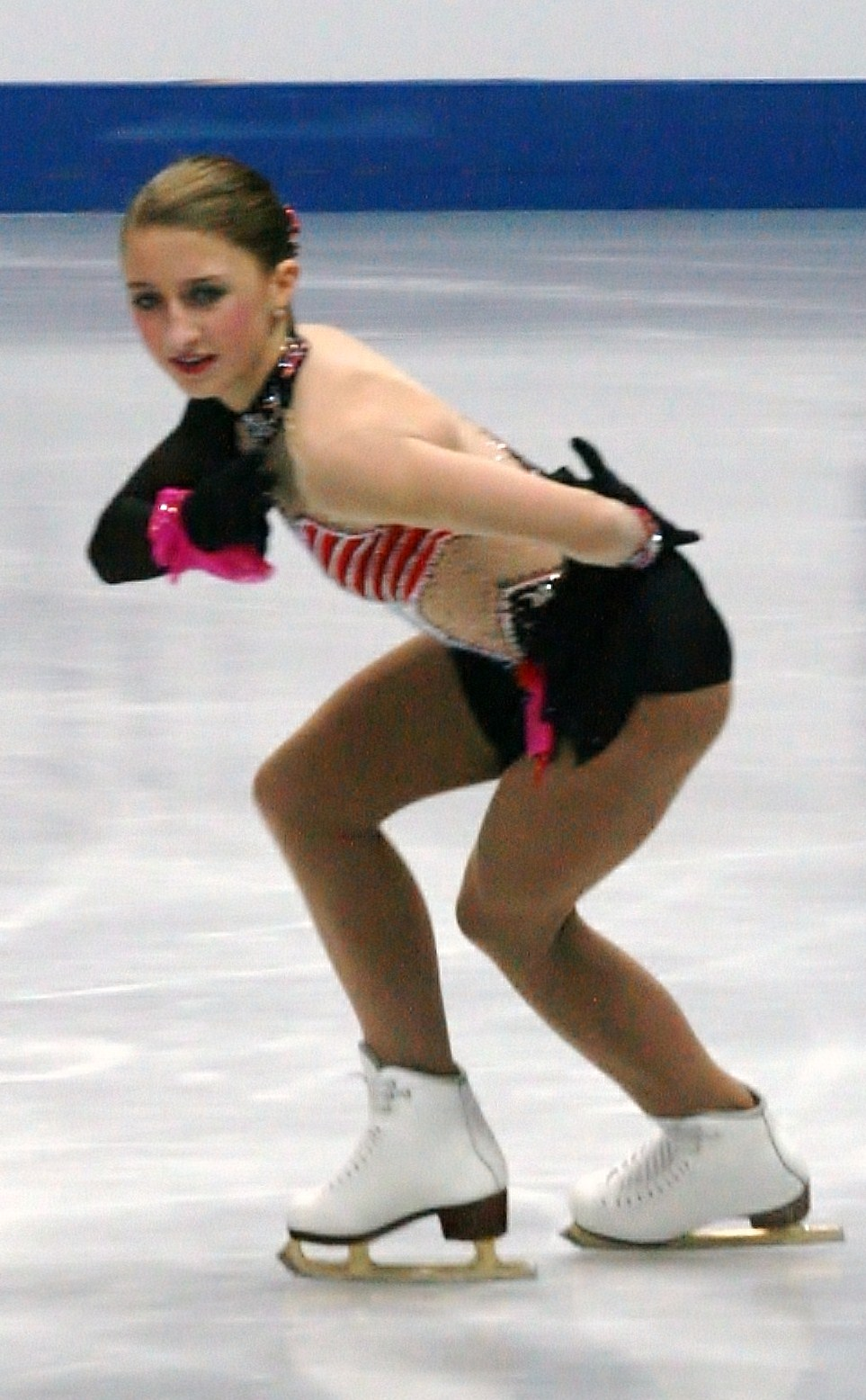 Ханна Миллер (США) на финале Гран-при среди юниоров 2012-2013. Короткая программа.